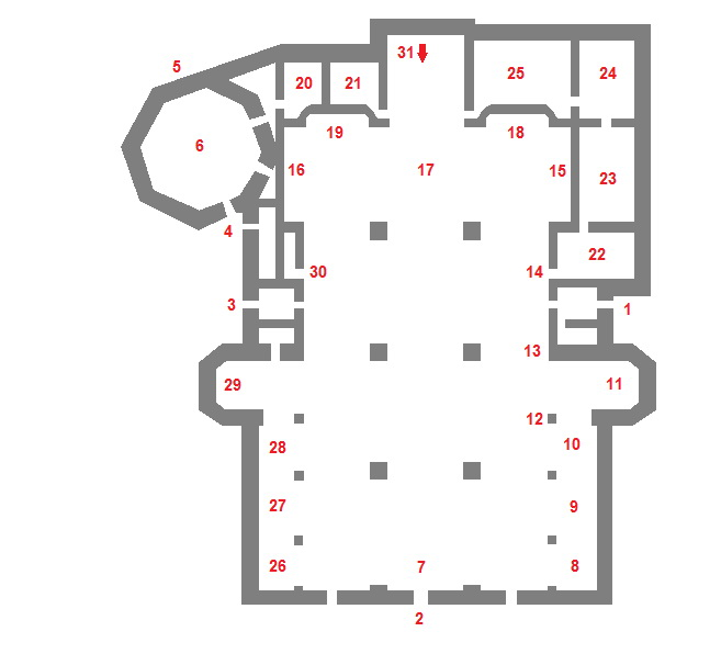 Duomo di Udine - Pianta Descrizione 1 - Portale 2 - Portale della Redenzione 3 - Portale 4 - Portale dell'Incoronazione 5 - Statue dell'Annunciata e dell'Arcangelo Gabriele 6 - Campanile 7 - Controfacciata 8 - Cappella della Santissima Trinità 9 - Cappella dei santi Ermacora e Fortunato 10 - Cappella dei santi Eustachio e Giovanni Battista 11 - Cappella del Santissimo Sacramento 12 - Pulpito 13 - statua del vescovo Zaccaria Bricito 14 - Organo 15 - Mausoleo Manin e 16 - Mausoleo Manin e 17 - Altare maggiore 18 - Altare del Nome di Maria 19 - Altare del Nome di Gesù 20 - Cappella del Corpo di Cristo 21 - Cappella di san Nicolò 22 - Sacrestia 23 - Aula dei Canonici 24 - Aula dei mansionari 25 - ...... 26 - Cappella di san Marco 27 - Cappella di san Giuseppe 28 - Cappella della Madonna della Divina Provvidenza 29 - Cappella delle Reliquie 30 - Organo 31 - Accesso alla cripta